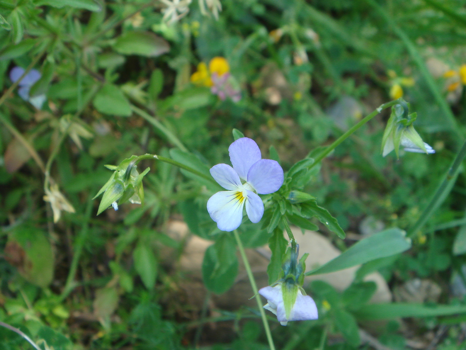 Pensamiento (Viola saxatilis), Llanos de la Larri, Pirineos, (Huesca) España